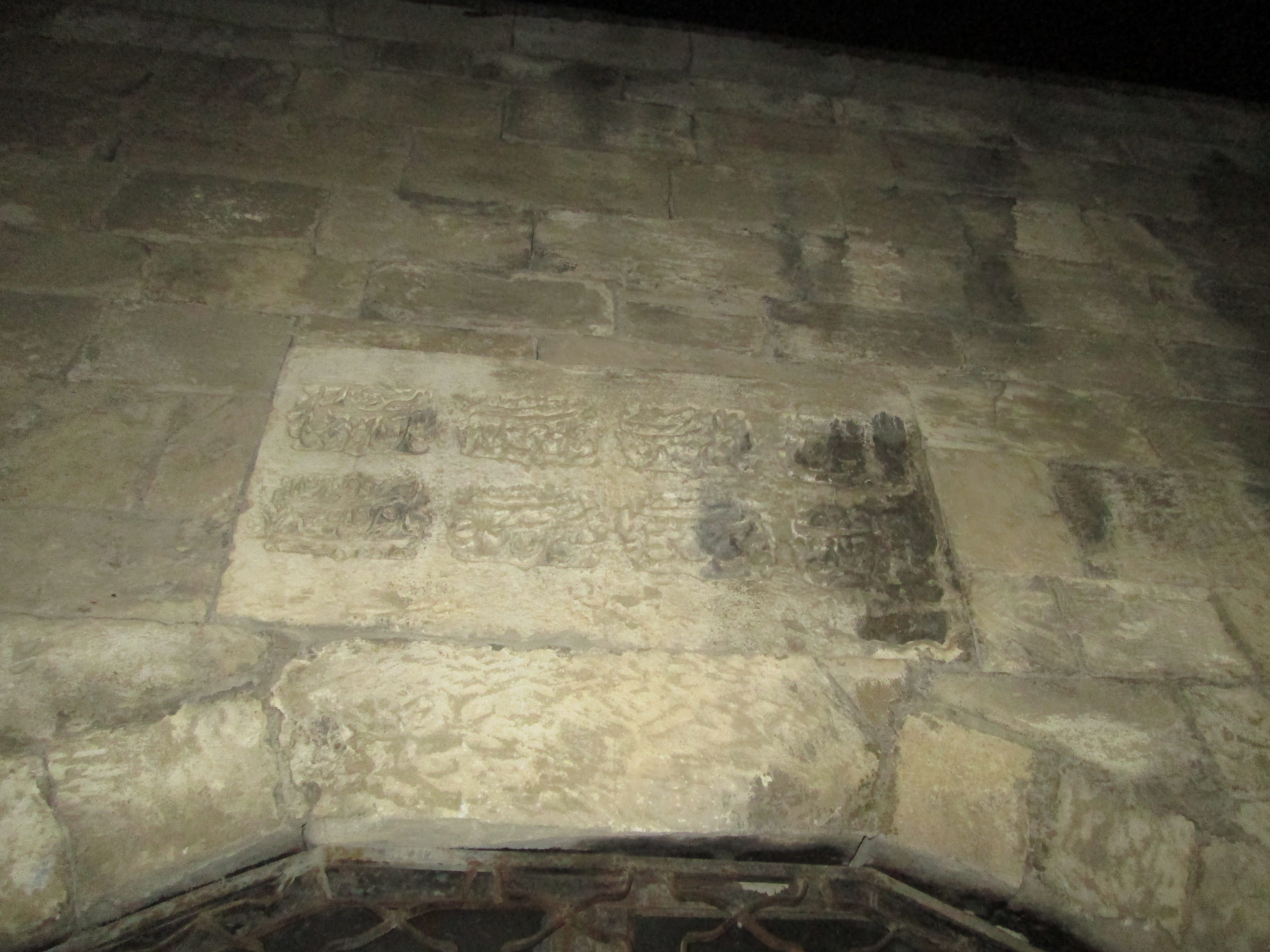 Mədrəsə məscid (İçəri Şəhər)